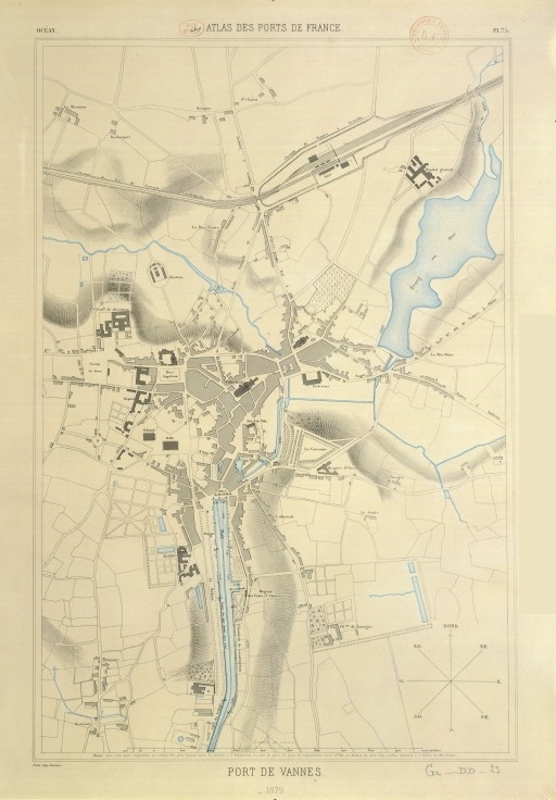 Plan du port de Vannes en 1879